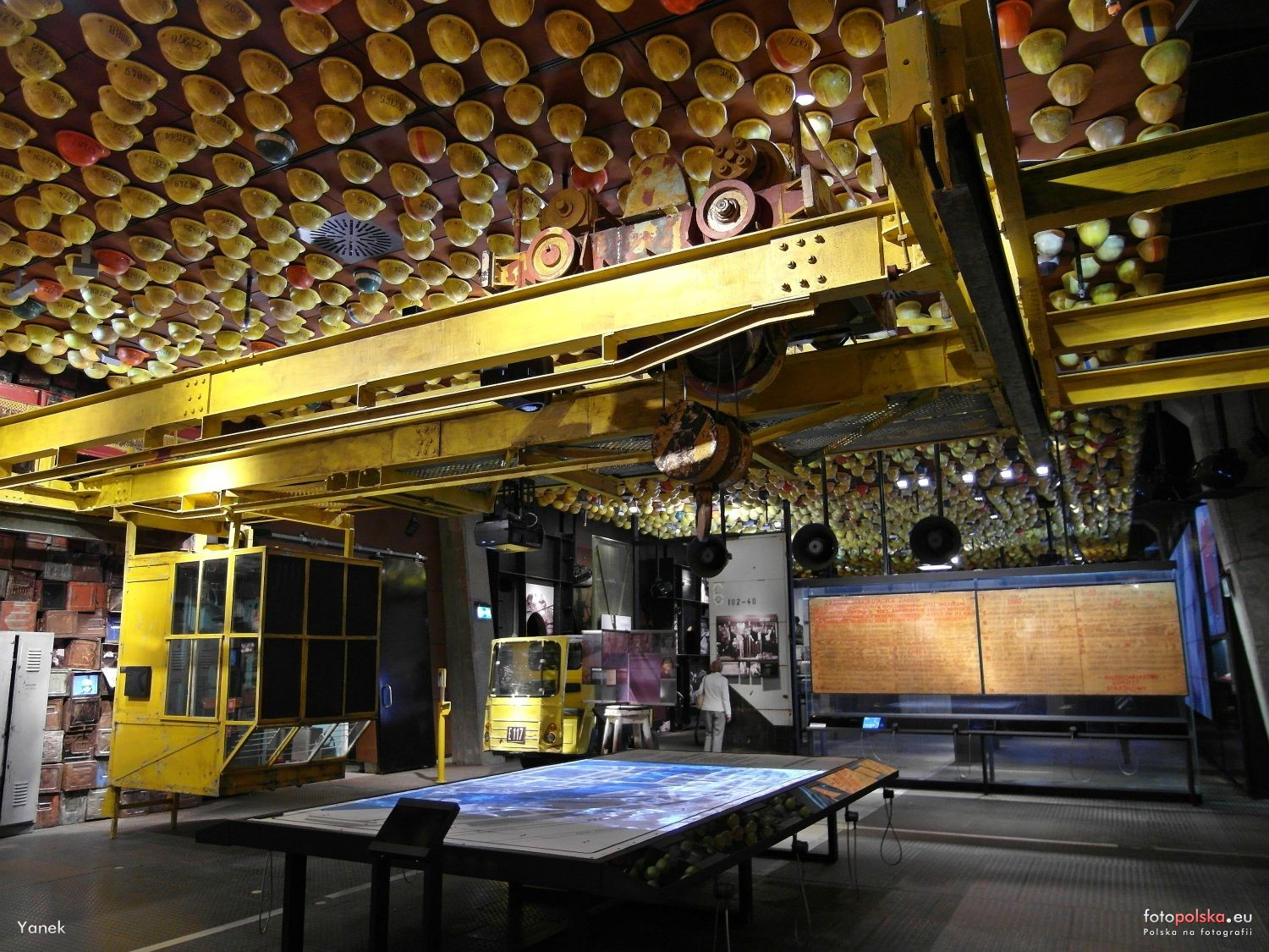 Europejskie Centrum Solidarności w Gdańsku. Sala A wystawy stałej.